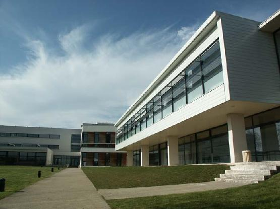 Photo des locaux de l'ESGT au Mans